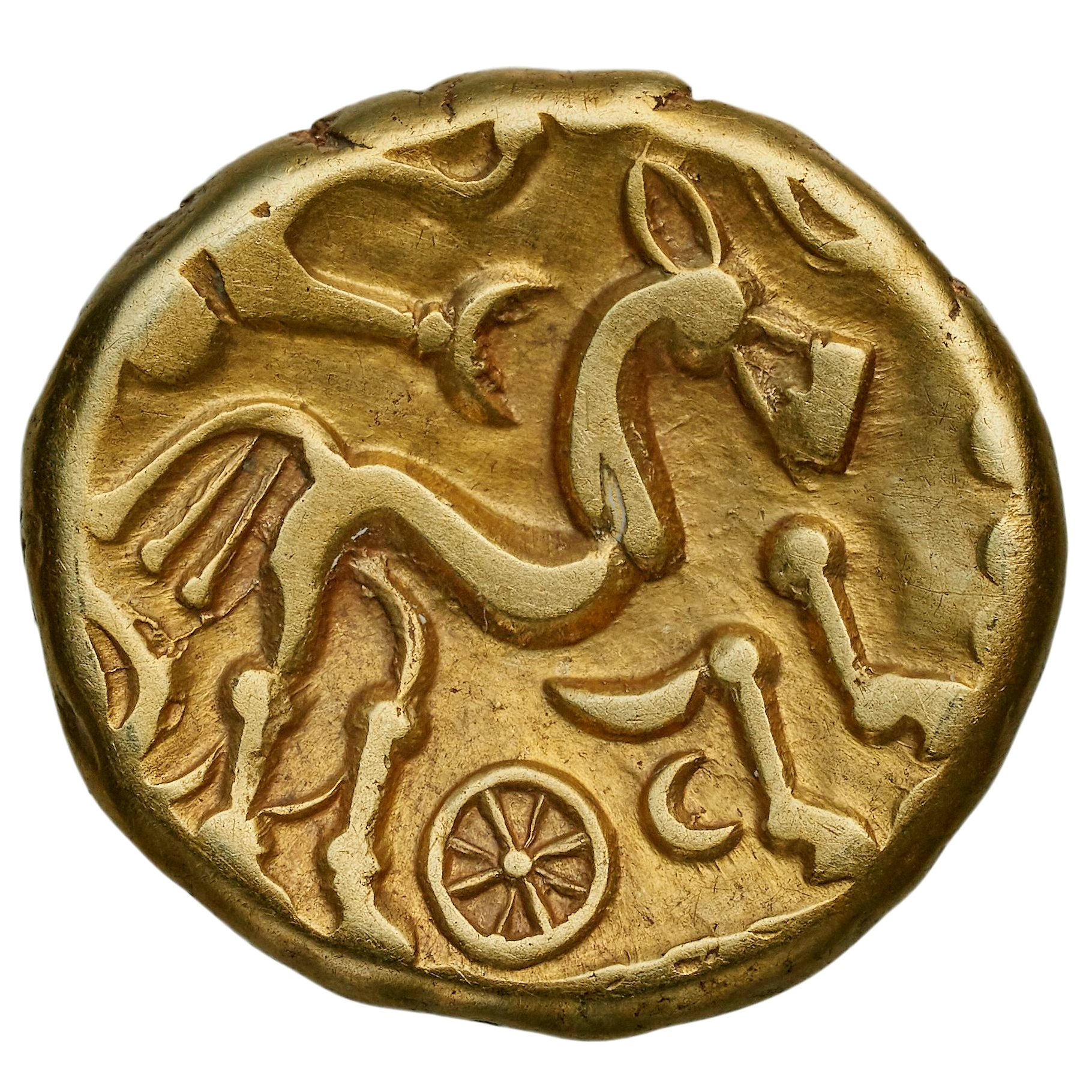 Statère des Suessions. Revers : Aurige guidant un char stylisé et disloqué. Or, 5,9 gr. vers -200. Collection BnF : 1986.68 (GAU-11548)